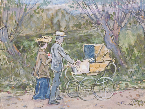 Jan Toorop - Mies Drabbe en Paul Elout (Paulus Johannes Elout van Soeterwoude) achter de kinderwagen. 1903 Aquarel op papier, 11.5 x 15.5 cm